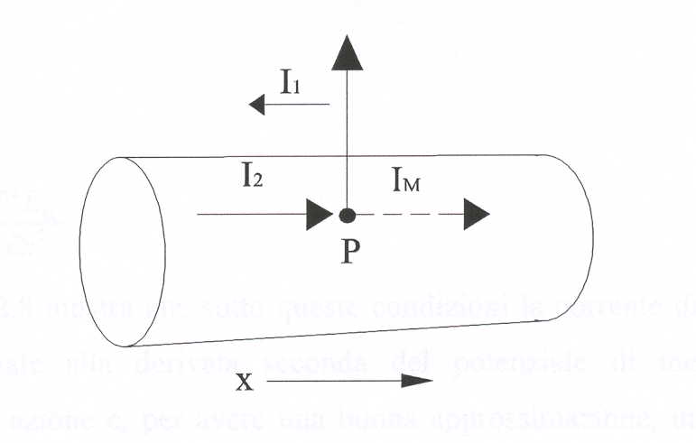 Descrizione assone